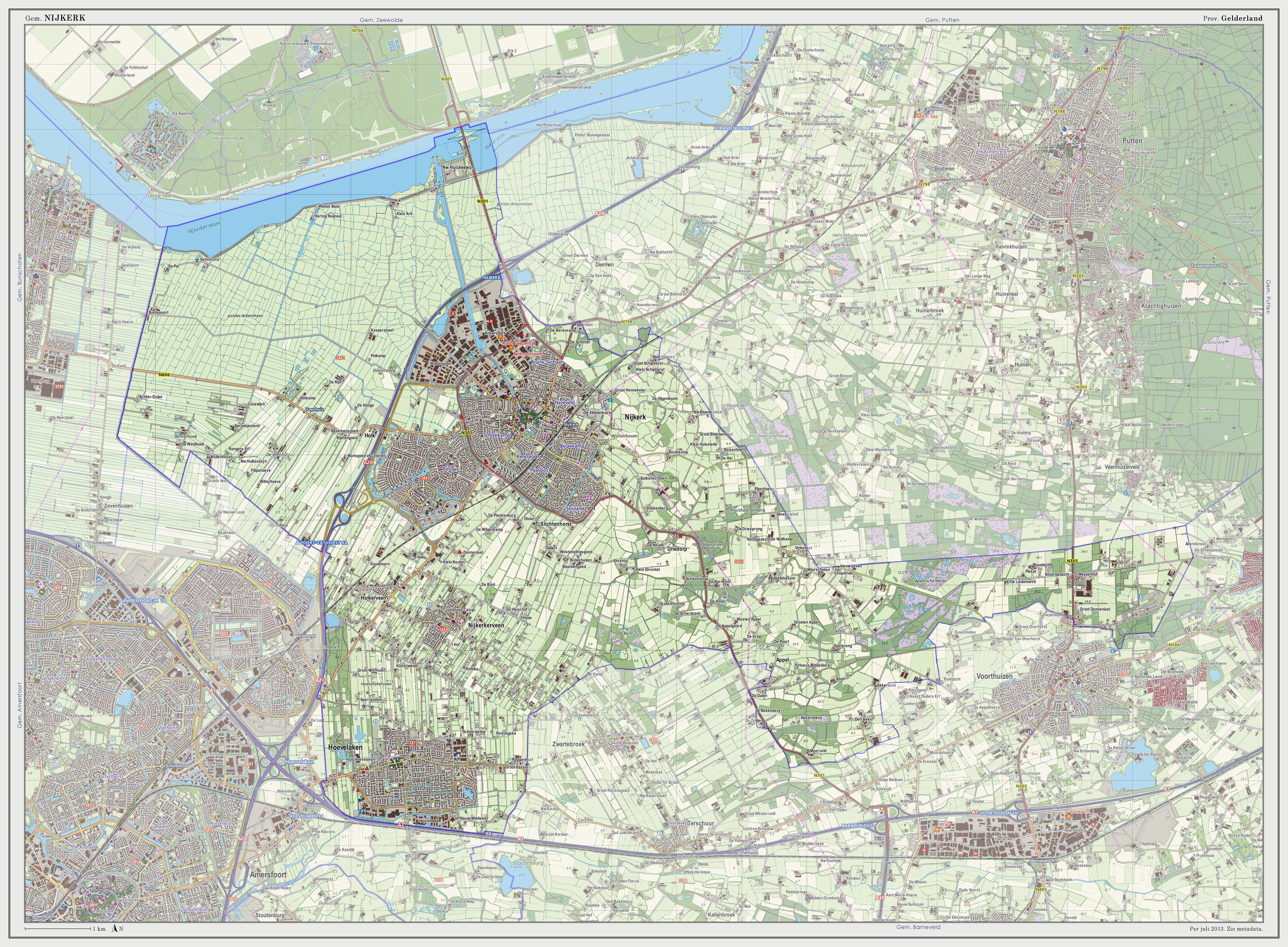 Topografische kaart van gemeente Nijkerk (2013). Samengesteld door Jan-Willem van Aalst op basis van de GML open geodata van de BRT/Top10NL (basisregistratie Topografie, Kadaster 2011), vrijgegeven door Kadaster onder de Creative Commons BY licentie. Additionele gegevens uit BAG (8 juli 2013), uit de Open Street Map (9 juli 2013) en uit de Risicokaart. Peildatum kaartbeeld: 9 juli 2013. Zie ook Gemeentenatlas.nl Samenstelling en kleurenschema: Jan-Willem van Aalst, met QuantumGIS en Photoshop. Zie ook de Legenda.